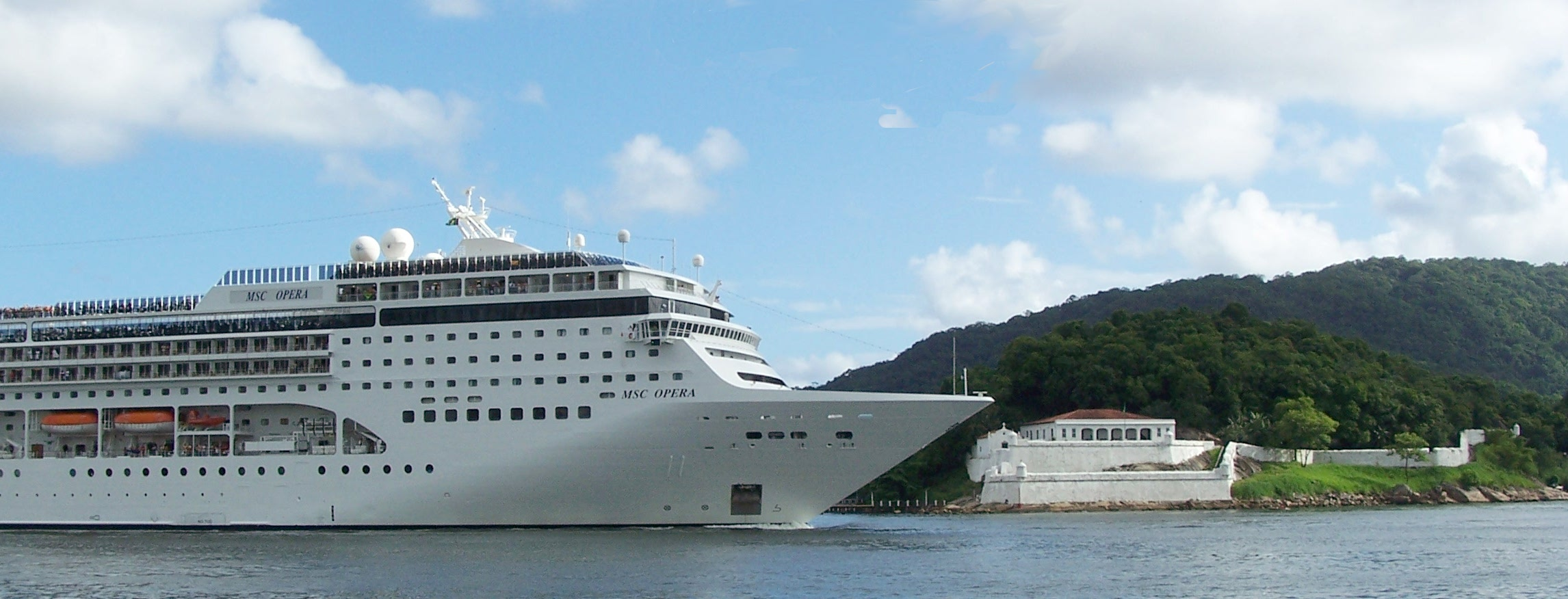 MSC Opera partindo do porto de Santos, Brasil. Ao fundo: Fortaleza de Santo Amaro da Barra Grande (1584).